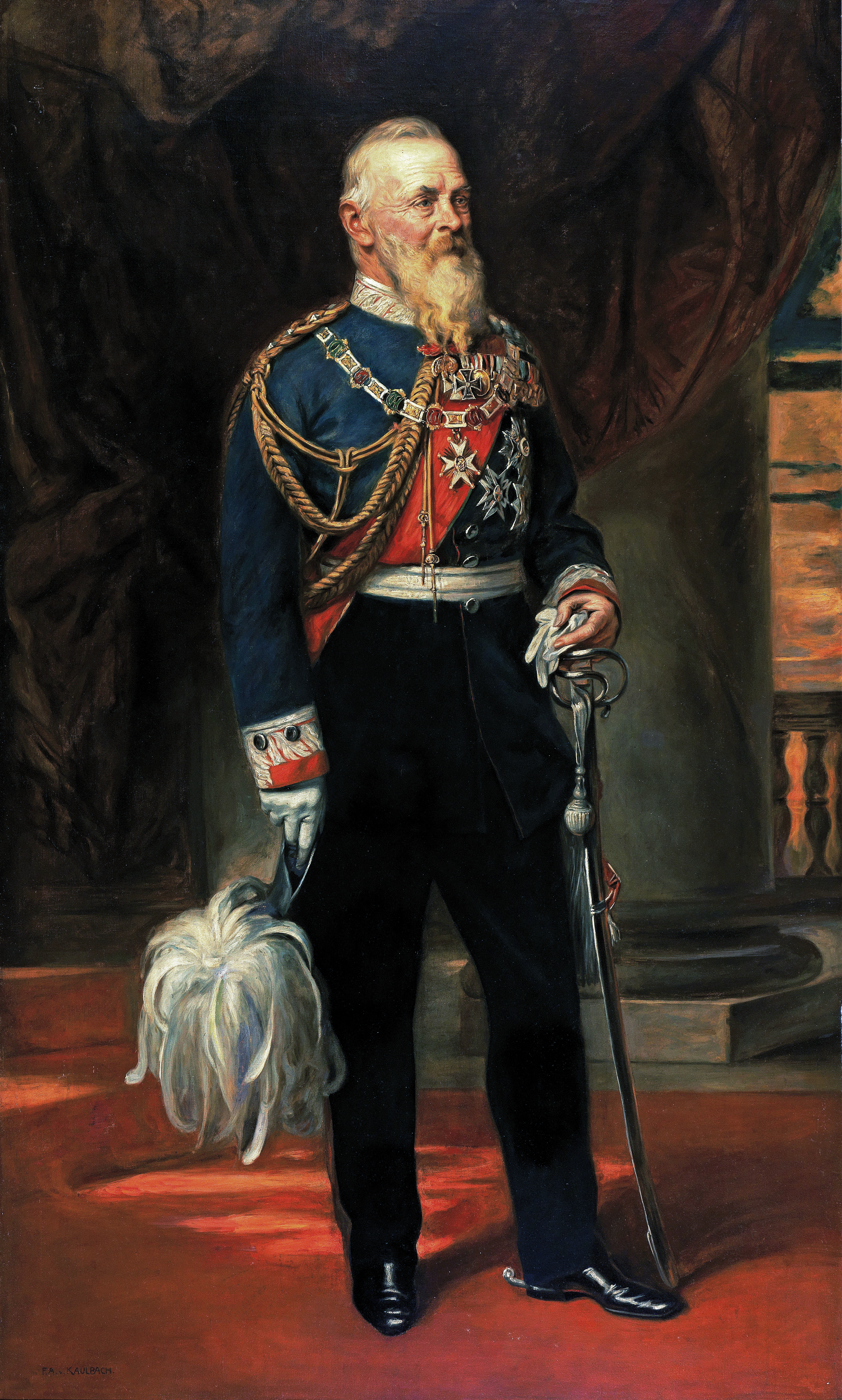 Prinzregent Luitpold von Bayern, signiert F. A. v. Kaulbach, Öl auf Leinwand, 210 x 126 cm